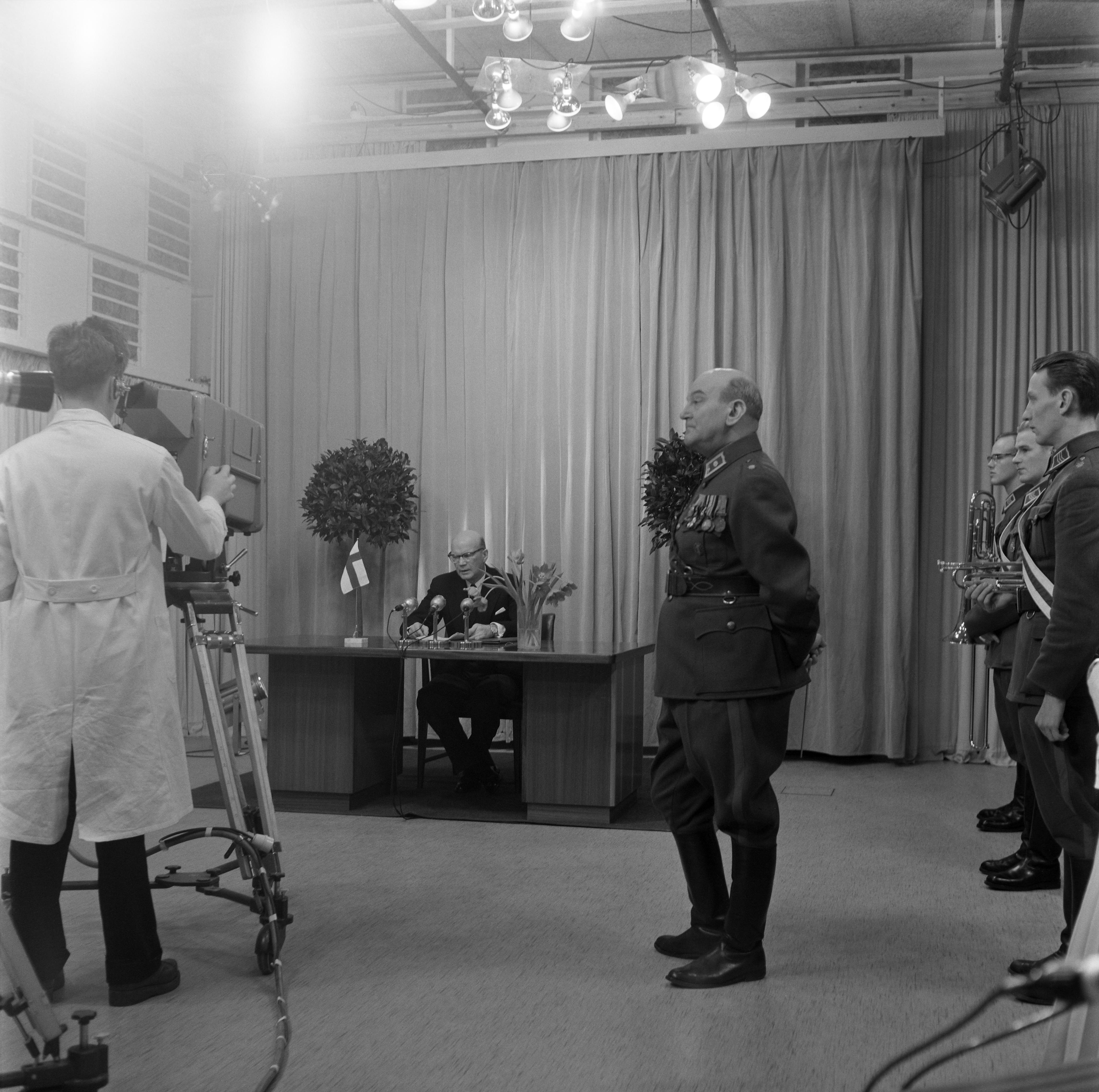 1.1.1958 in his New Year's speech President of Finland, Urho Kekkonen, shared his views on the condition of the nation. This studio was situated in the old Radio Broadcasting House in Pasila, Helsinki. The military marching band in the studio was lead by major (music) Martti Parantainen. Yleisradio aloitti säännölliset televisiolähetykset 1.1.1958. Vuosi käynnistyi juhlavasti presidentti Urho Kekkosen uudenvuodenpuheen televisioinnilla Pasilan alastudiosta, joka sijaitsi Helsingin radioaseman vanhassa lähetyshallissa. Kameramies kuvaa valkoisessa takissaan. Sotilassoittokuntaa studiossa johti musiikkimajuri Martti Parantainen (oikealla). Tiedätkö jotain tästä kuvasta? Jätä kommentti tai ota yhteyttä sähköpostitse: Tutustu Ylen arkistosisältöihin: Fler skatter från Yles arkiv: More about Yle, the Finnish Broadcasting Company